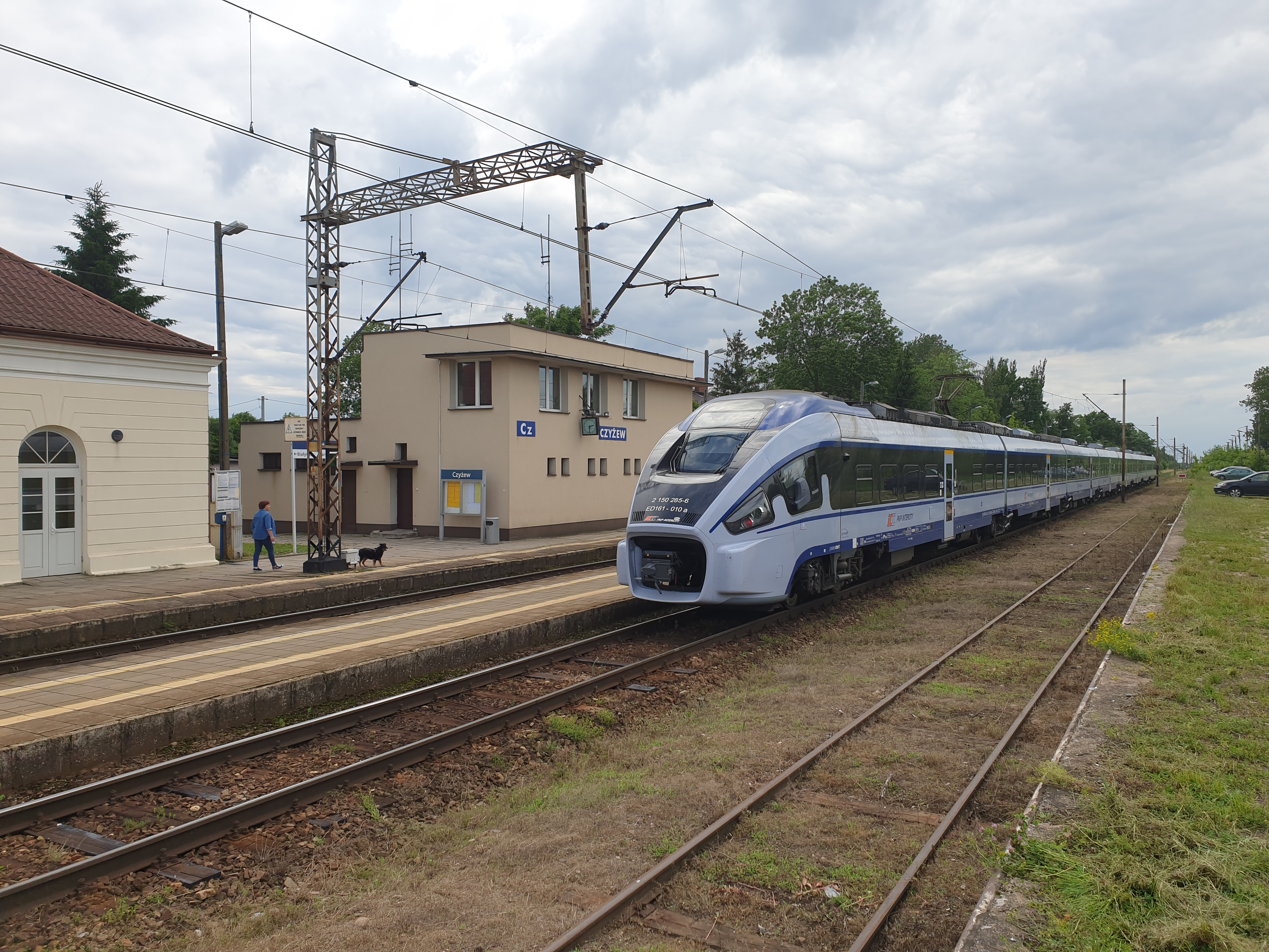 stacja kolejowa Czyżew - skład Pesa Dart (ED161 - 010) jako pociąg IC1629 Nałkowska relacji Białystok - Zgorzelec